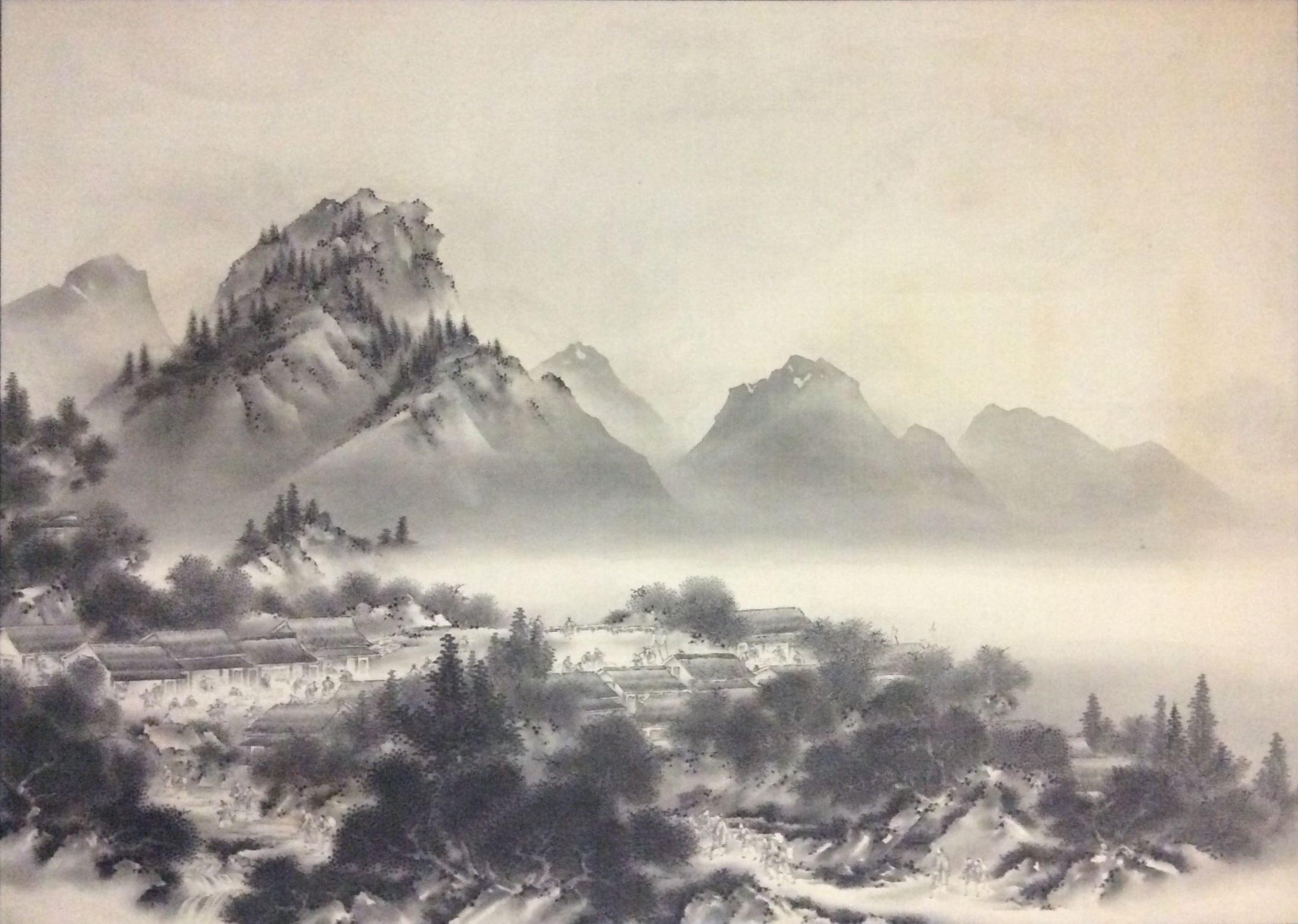 杉浦俊香作の水墨山水図